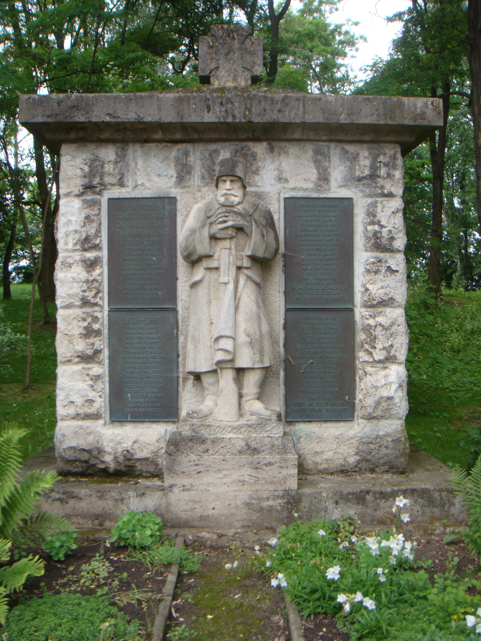 Kriegerdenkmal des Ersten Weltkrieges mit Ergänzung und neuer Sinngebung